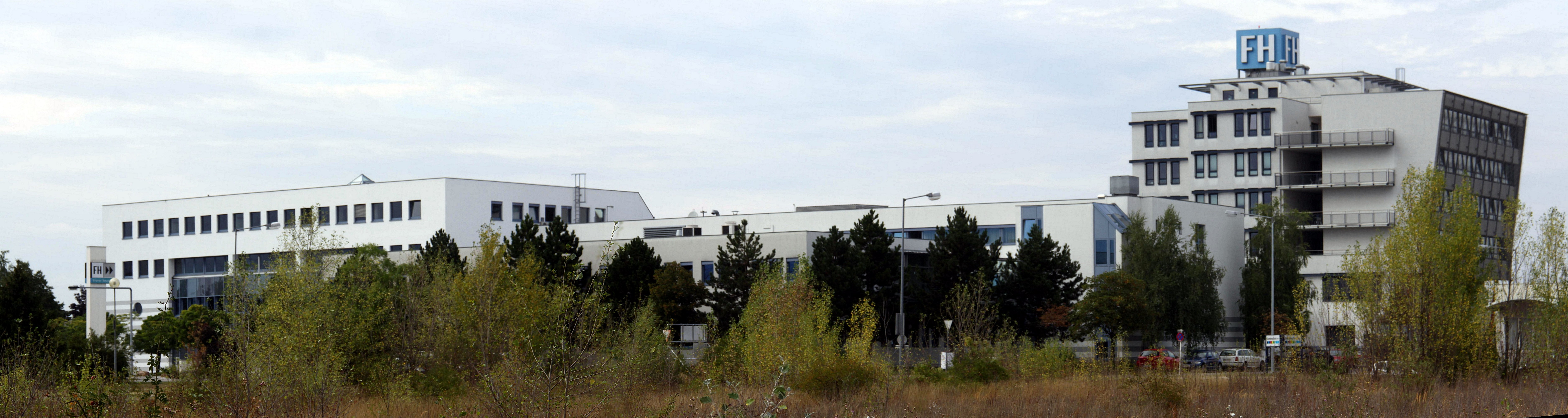 Fachhochschule in Wiener Neustadt, Übersicht (Panorama, zusammengesetzt aus 3 Einzelbildern)